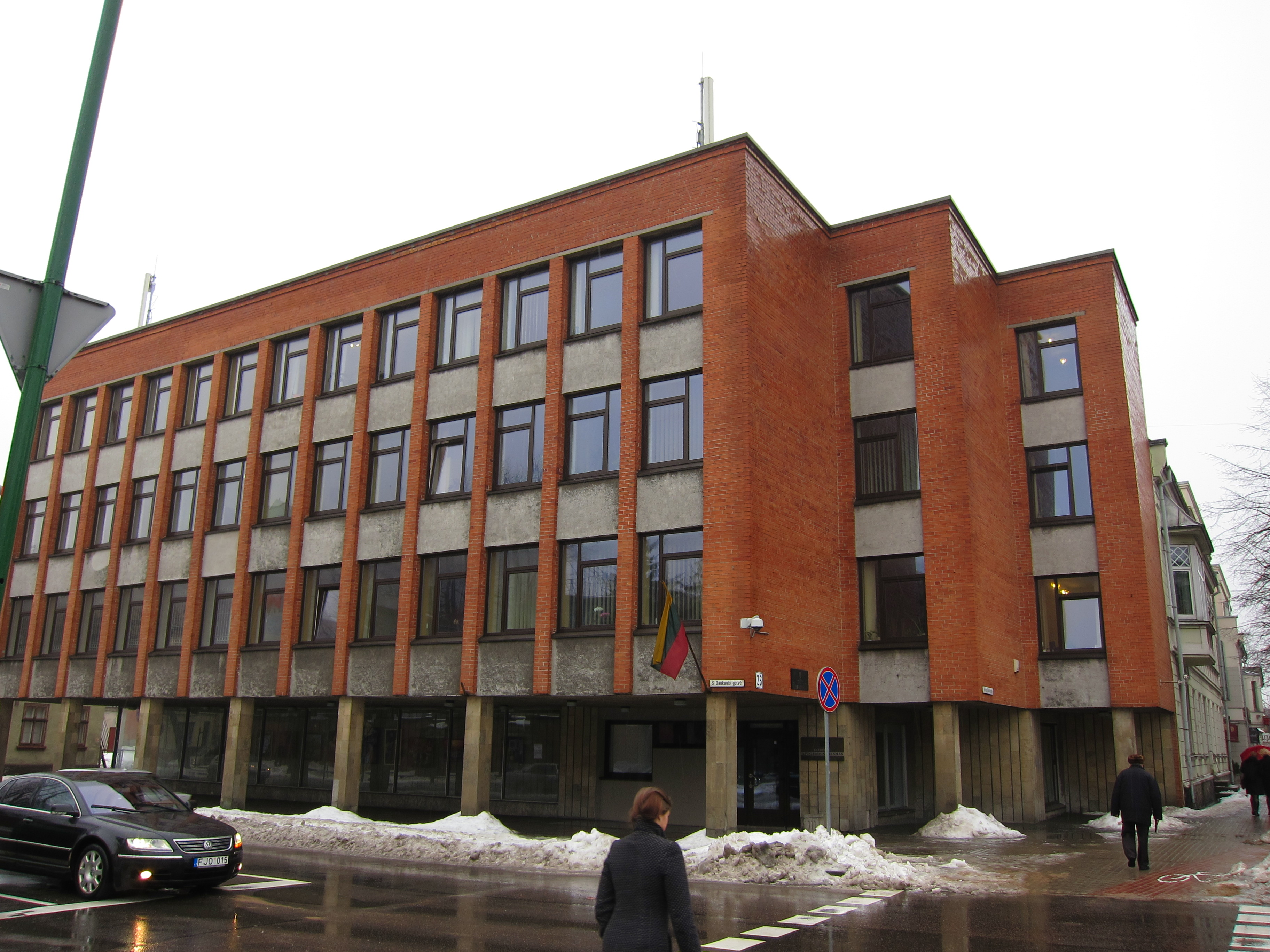 Klaipėdos apygardos teismas